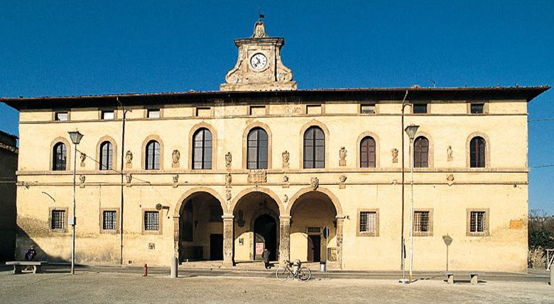 foto scattata dall'autore